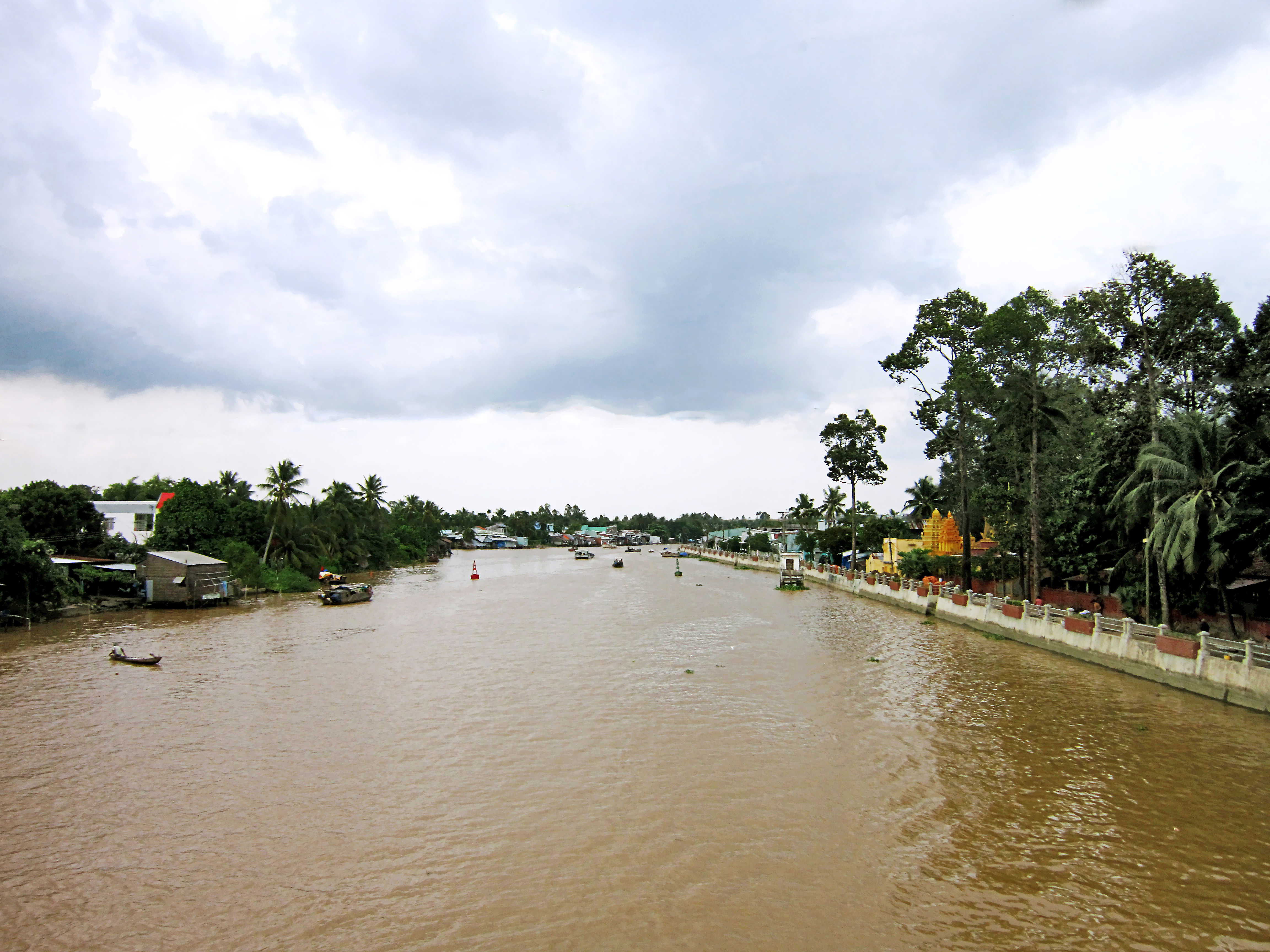 Sông Ô Môn, đoạn chảy qua cầu Ô Môn và chùa Pôthi Somrôn ở huyện Ô Môn, Cần Thơ, Việt Nam.